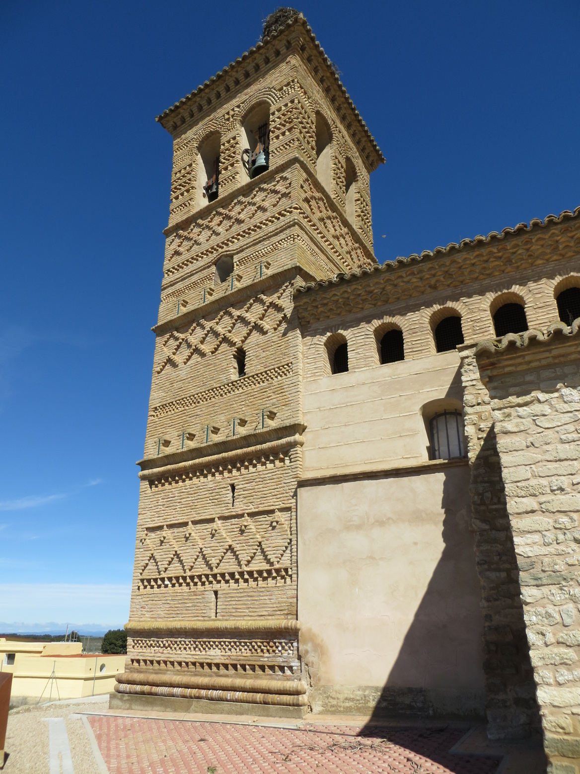 Torre mudéjar de la Iglesia Parroquial de Torralba de Aragón